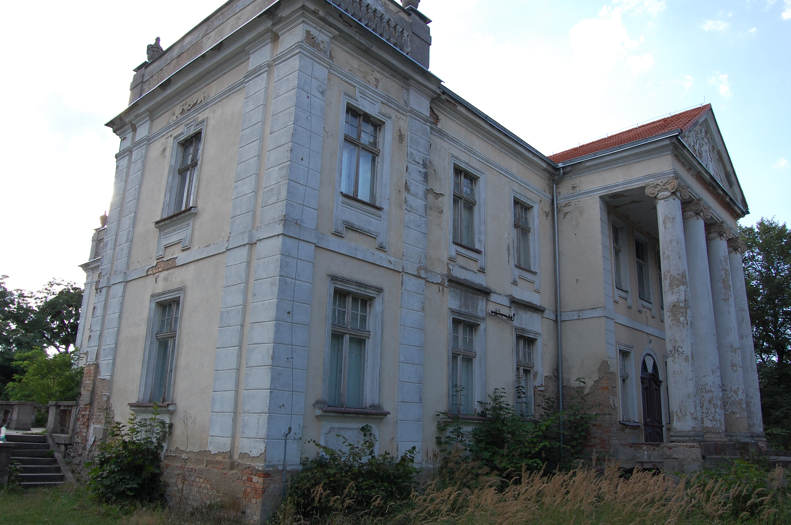 Pałac w Paruszewie w 2014 r.